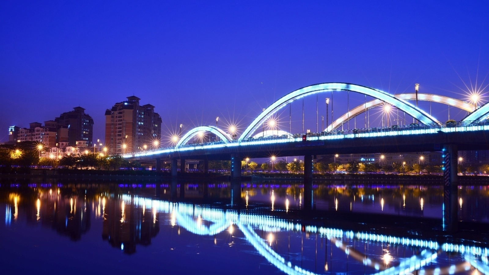 德兴大桥2015